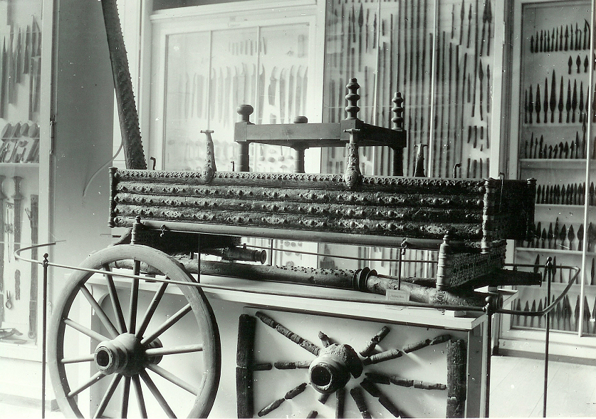 Dejbjergvognen